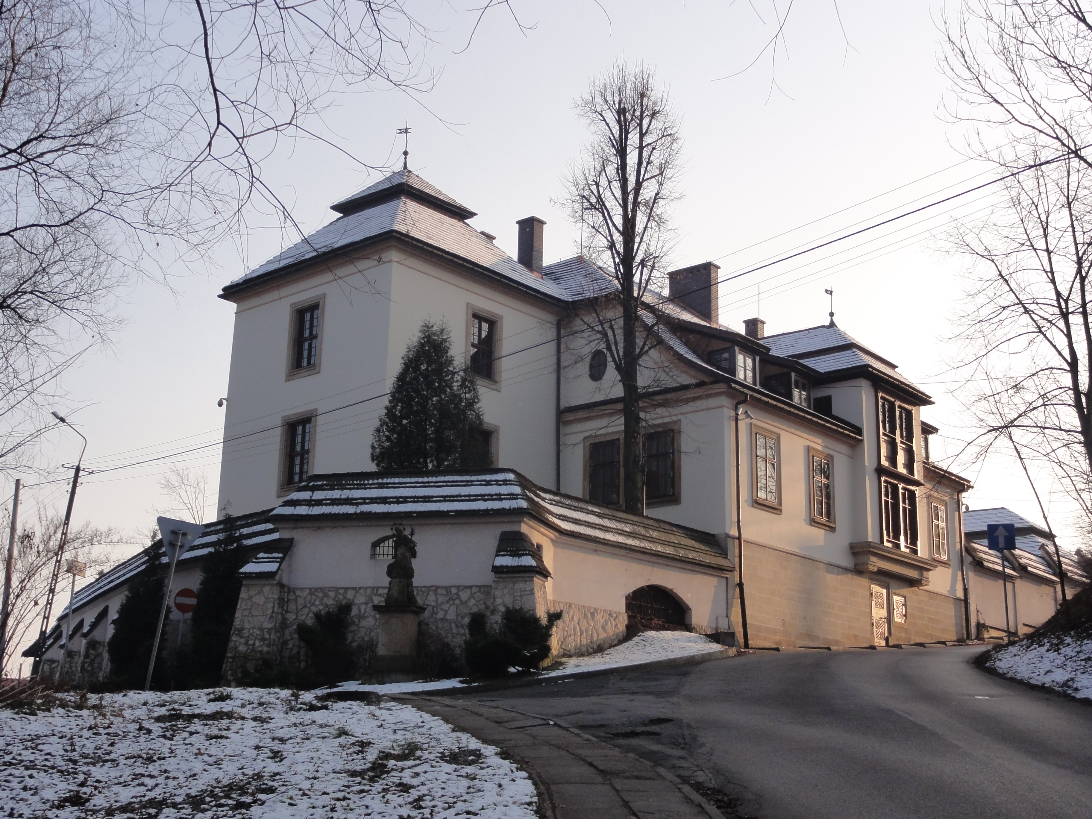 Dworek w architekturze renesansowej został wzniesiony w szesnastym wieku dzięki wstawiennictwu cieszyńskiej rodziny mieszczańskiej. Zabytkowy pałac składał się z dwukondygnacyjnej wieży nakrytej mansardowym dachem i piętrowego budynku. Dworek ozdobiono dekoracjami wykonanymi z piaskowca. W siedemnastym wieku dworek stał się własnością cieszyńskich książąt z dynastii habsburskiej.